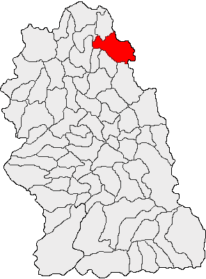 Categorie:Hărţi ale judeţului Hunedoara